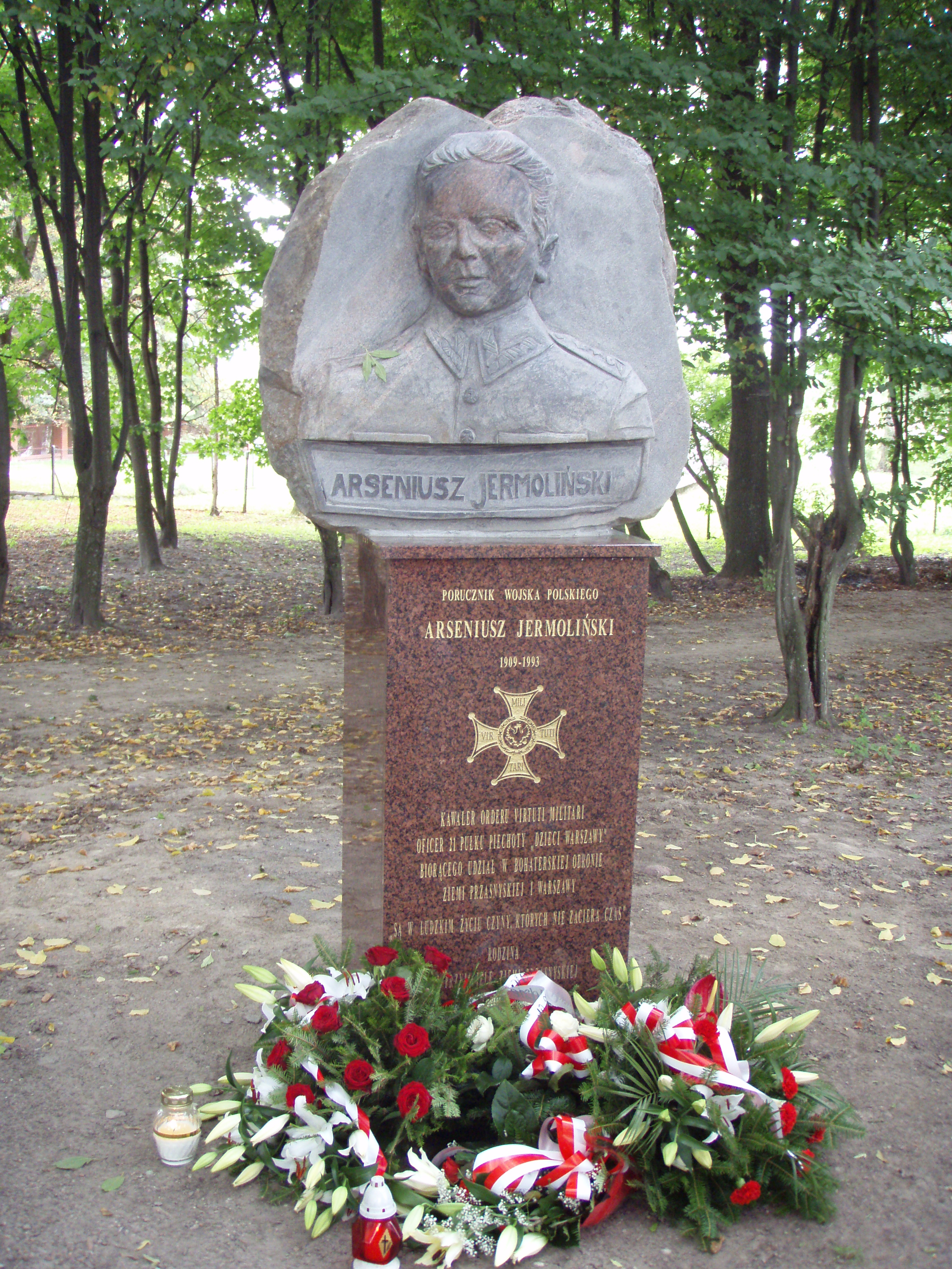 pomnik Arseniusz Jermoliński w Parku Dydaktycznym Rostkowo